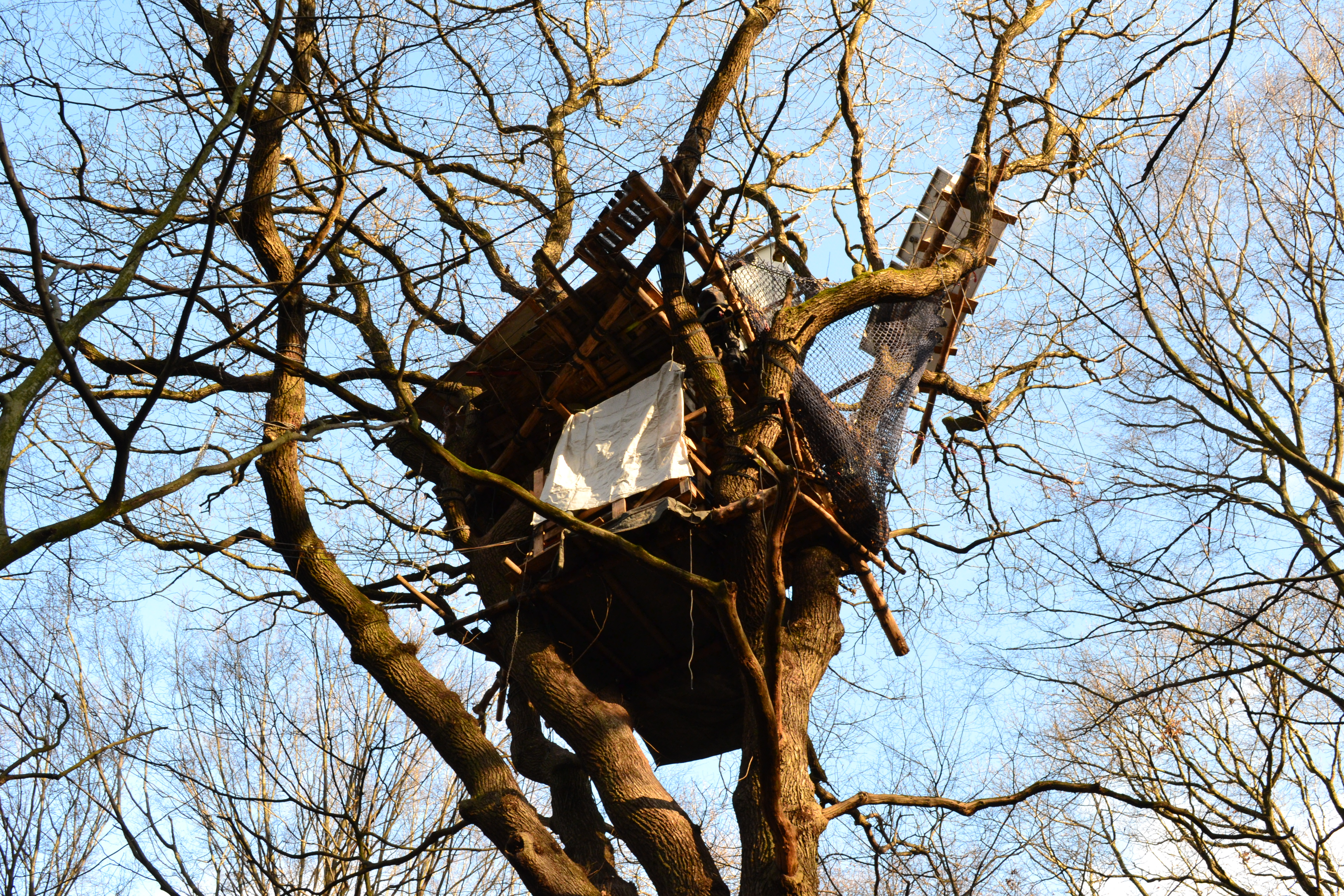 Baumhaus der Widerstandskämpfer, die sich gegen die Zerstörung des Hambacher Forsts einsetzen